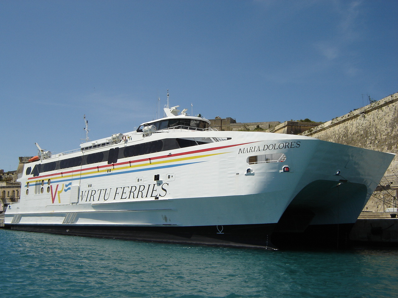 Boote und marine Anlagen, Zubehör und Details. Malta, April 2006. Katamaranschnellfähre Seitenansicht.